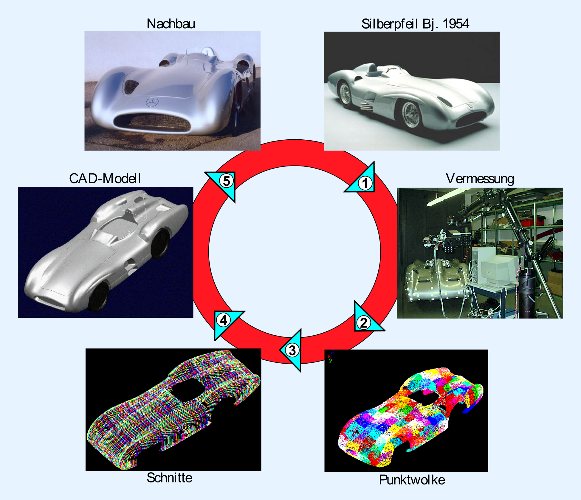 Der Reverse-Engineering-Prozess am Beispiel eines Silberpfeils, Baujahr 1954. Vom Original (1) wurde in 14 Stunden Messzeit eine Punktewolke (2) mit 98 Millionen Messpunkten erzeugt. Diese wurden auf achsparallele Schnitte im Abstand von zwei Zentimetern reduziert (3), auf denen in etwa 80 Arbeitsstunden ein CAD-Modell (4) konstruiert wurde. Auf Basis des CAD-Modells wurde schließlich ein Nachbau (5) im Maßstab 1:1 angefertigt.